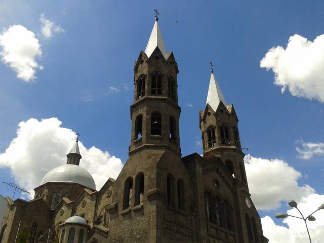 Basílica de Nuestra Señora de las Misericordias